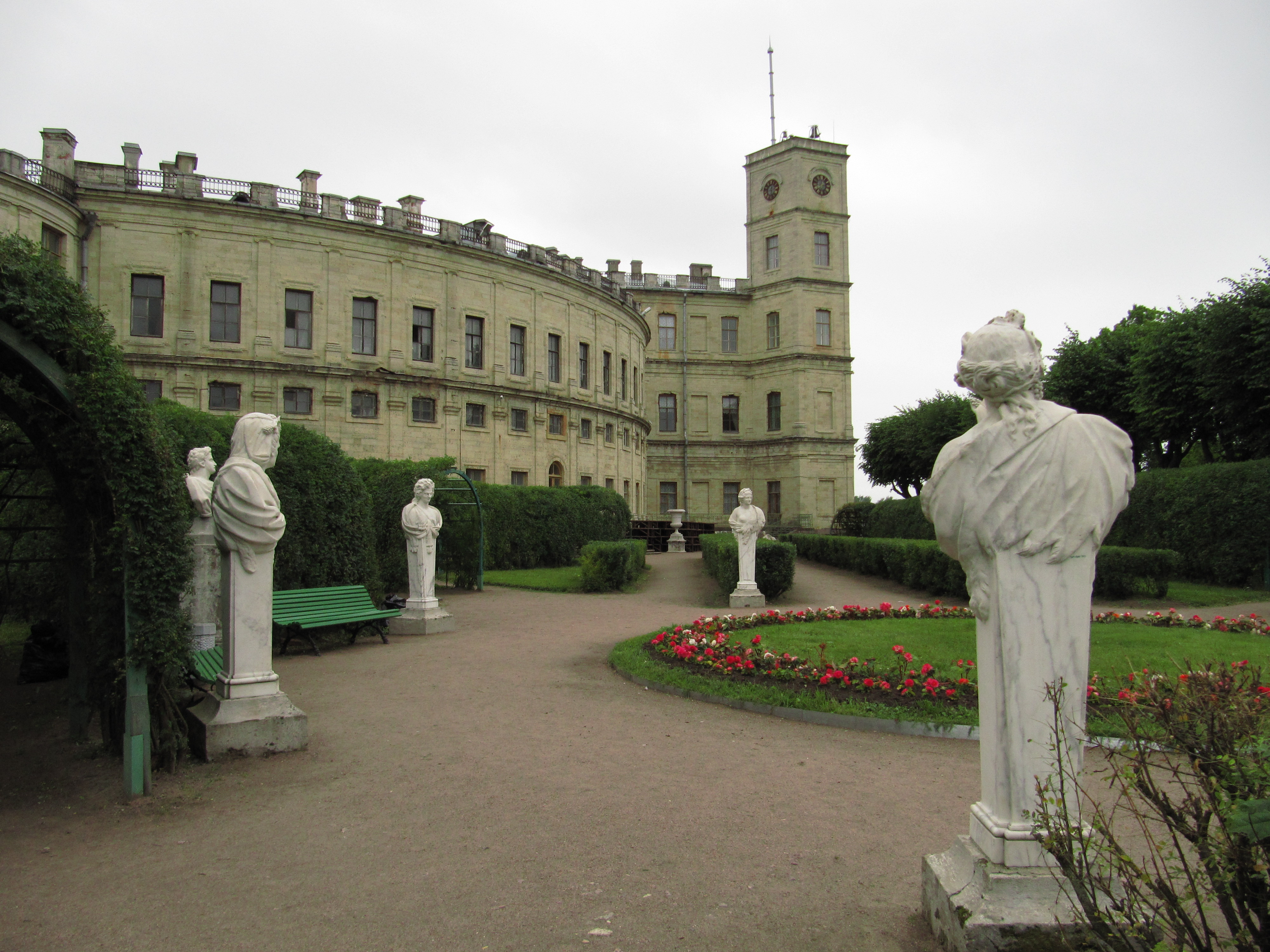 "Собственный сад" с террасой: Дворцовый парк, Гатчина, Гатчинский район, Ленинградская область